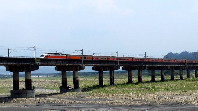 台鐵縱貫線第三代濁水溪橋 was filmed by TDCKW on 20180602